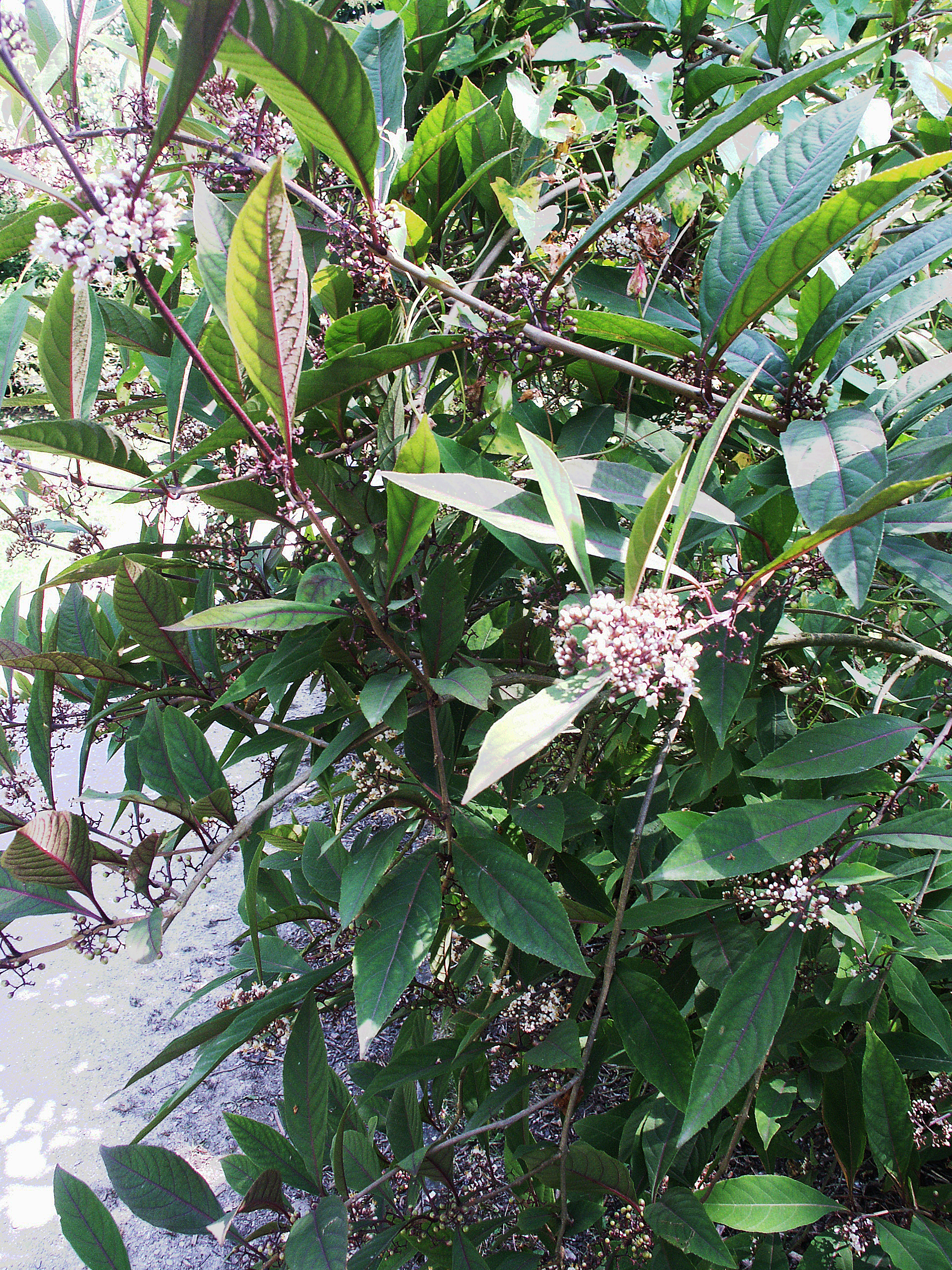 Callicarpa cathayana - Inflorescences - Jardin botanique de Strasbourg - France